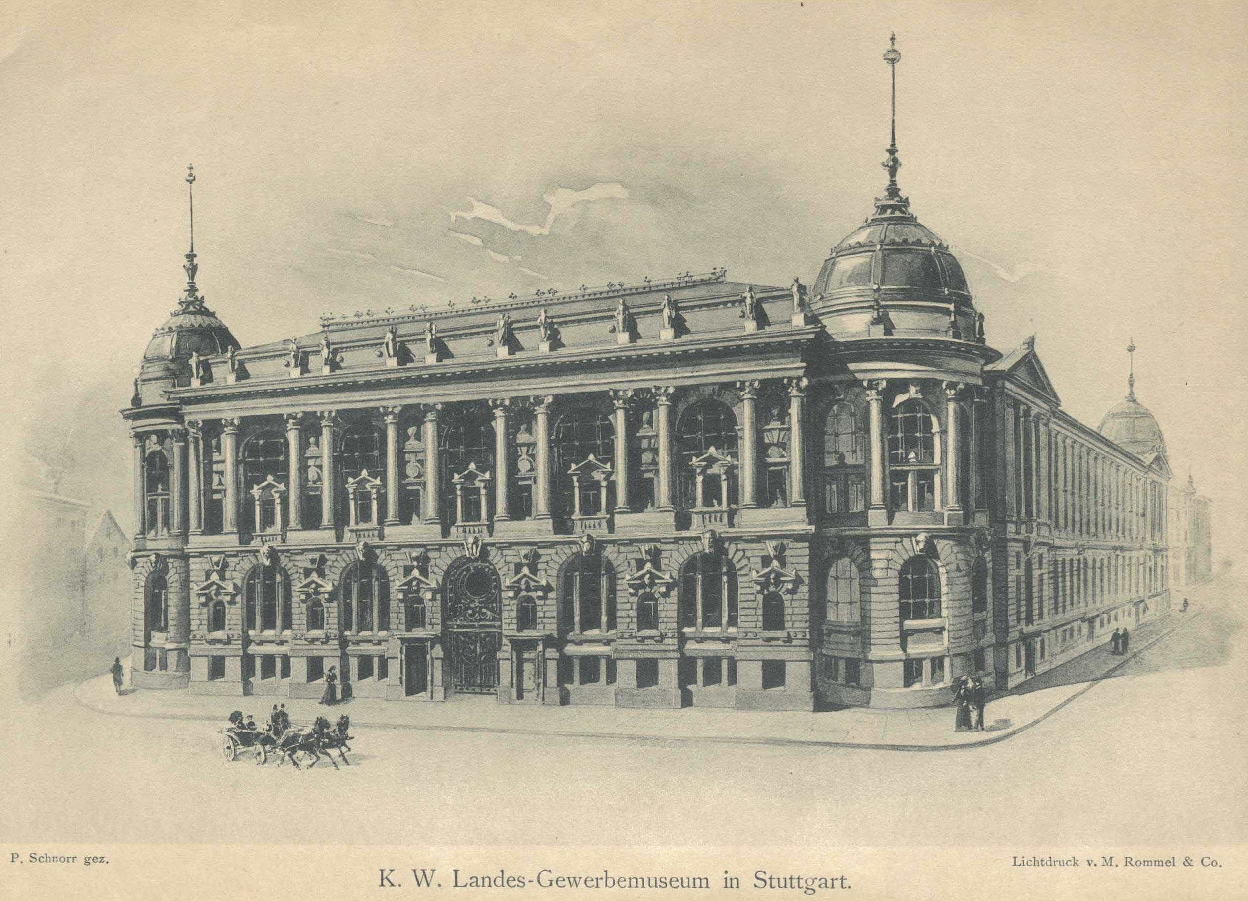 Peter Schnorr: Landesgewerbemuseum Stuttgart, Hauptbau in der Kanzleistraße (heute Willi-Bleicher-Straße), Zeichnung.